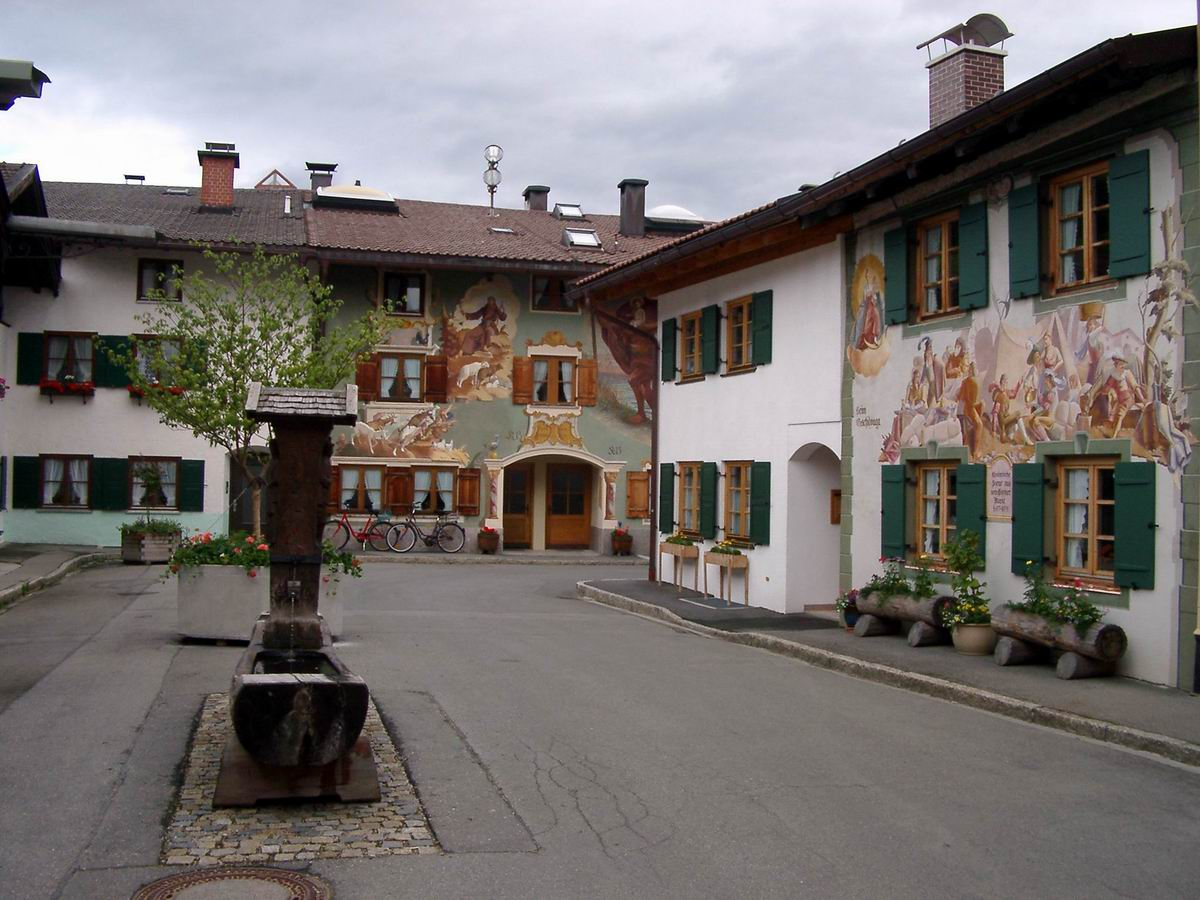 Mittenwald